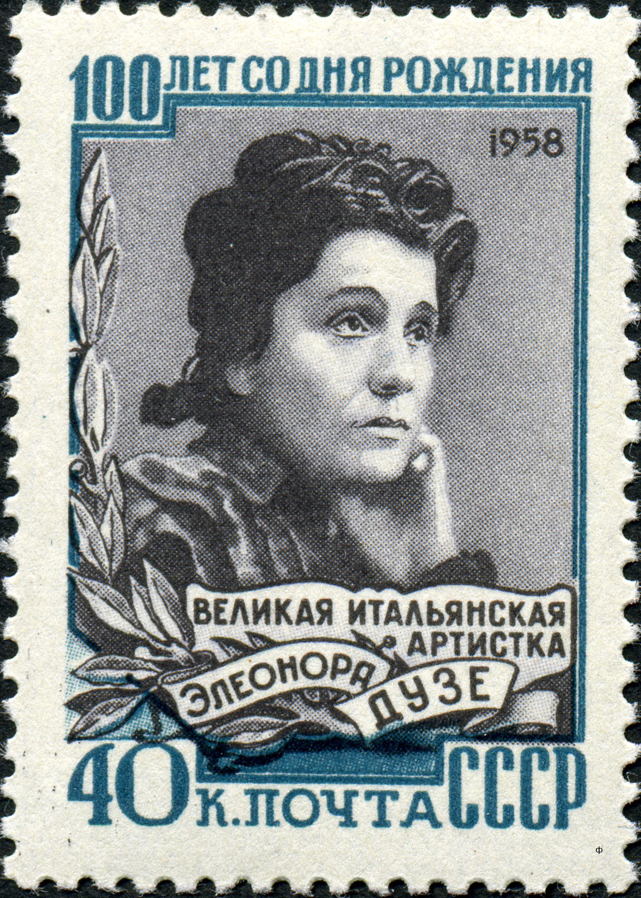 Марка СССР